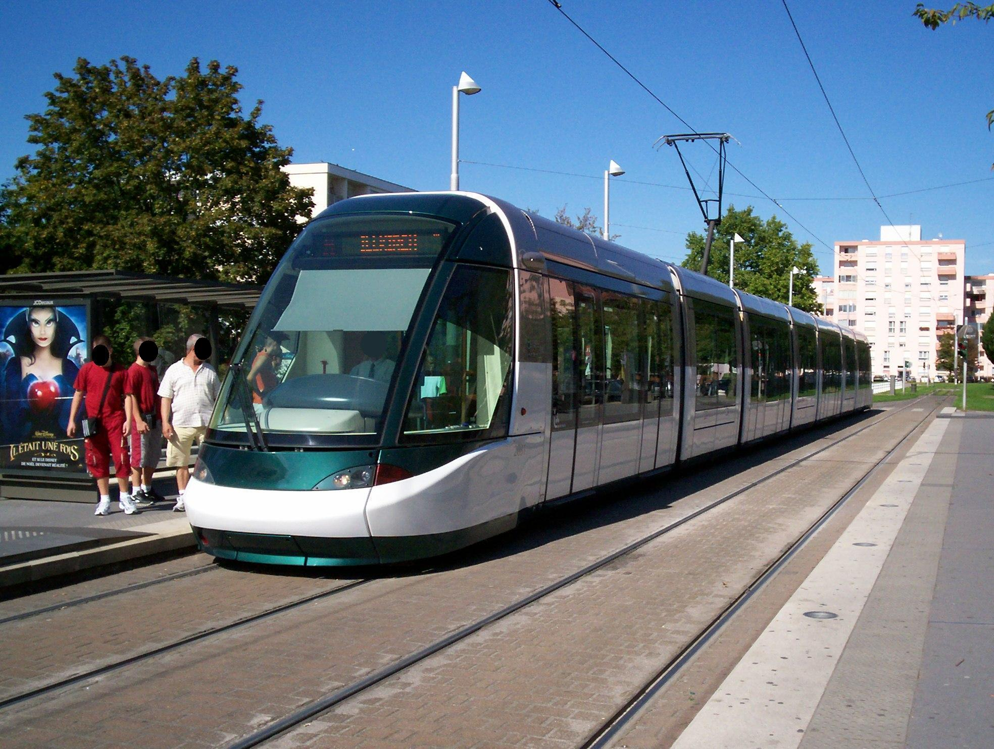 Tramway de Strasbourg Ligne A à Hautepierre Maillon, le 26 Août 2007, jour de l'inauguration de l'extension du réseau Tramway Strasbourgeois